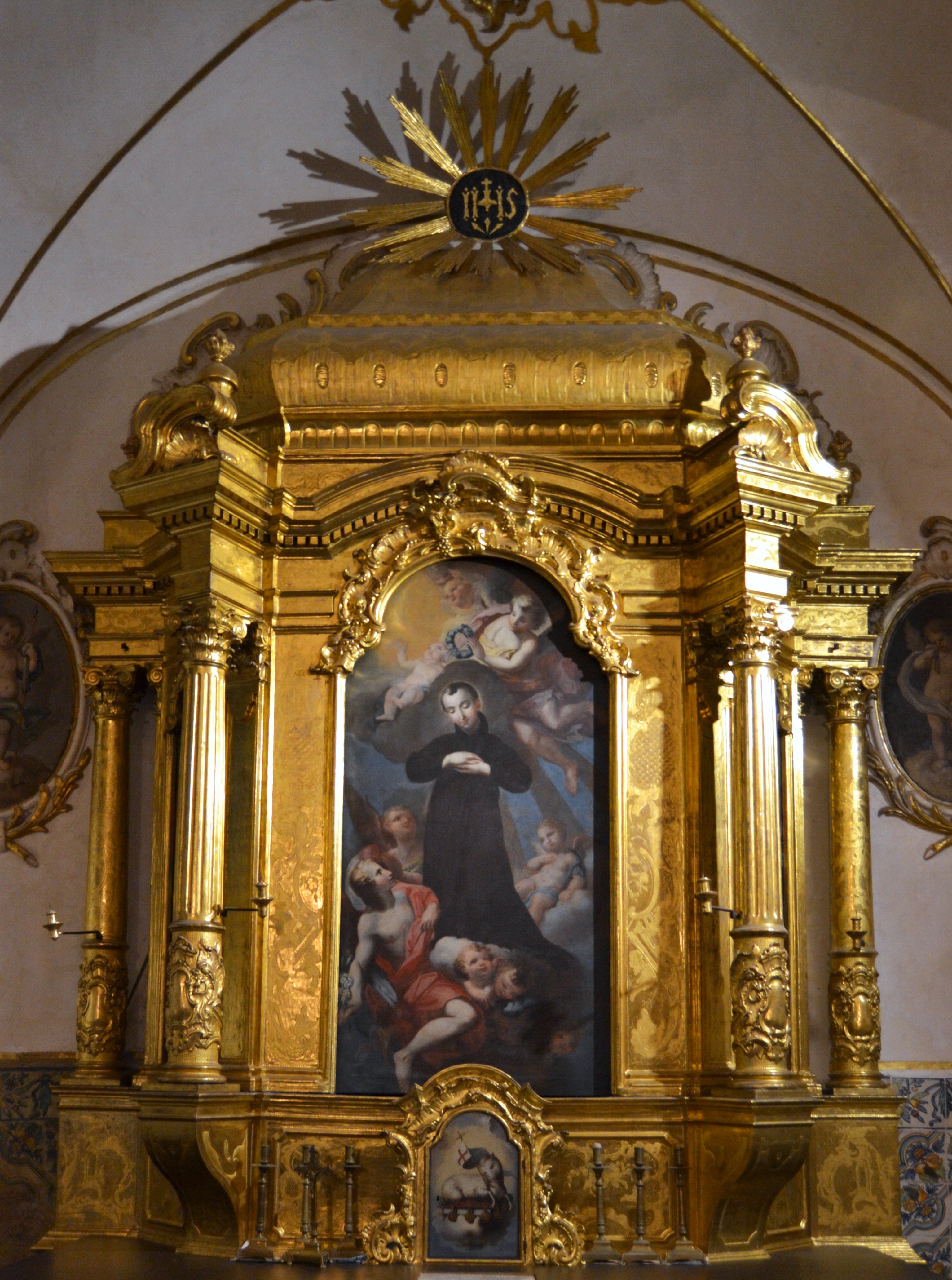 Retaule dedicat a Estanislau Kostka, capella fonda, església de sant Pau, institut Lluís Vives de València.